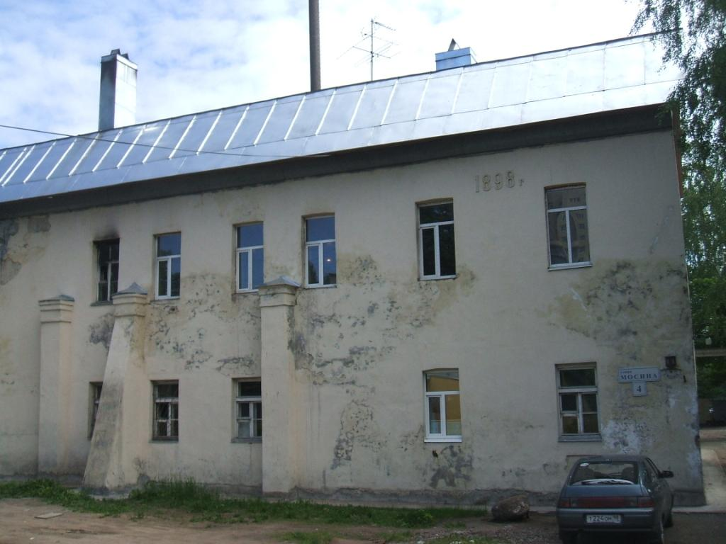 Сестрорецкая баня. Надпись на стене 1898 год начала постройки.